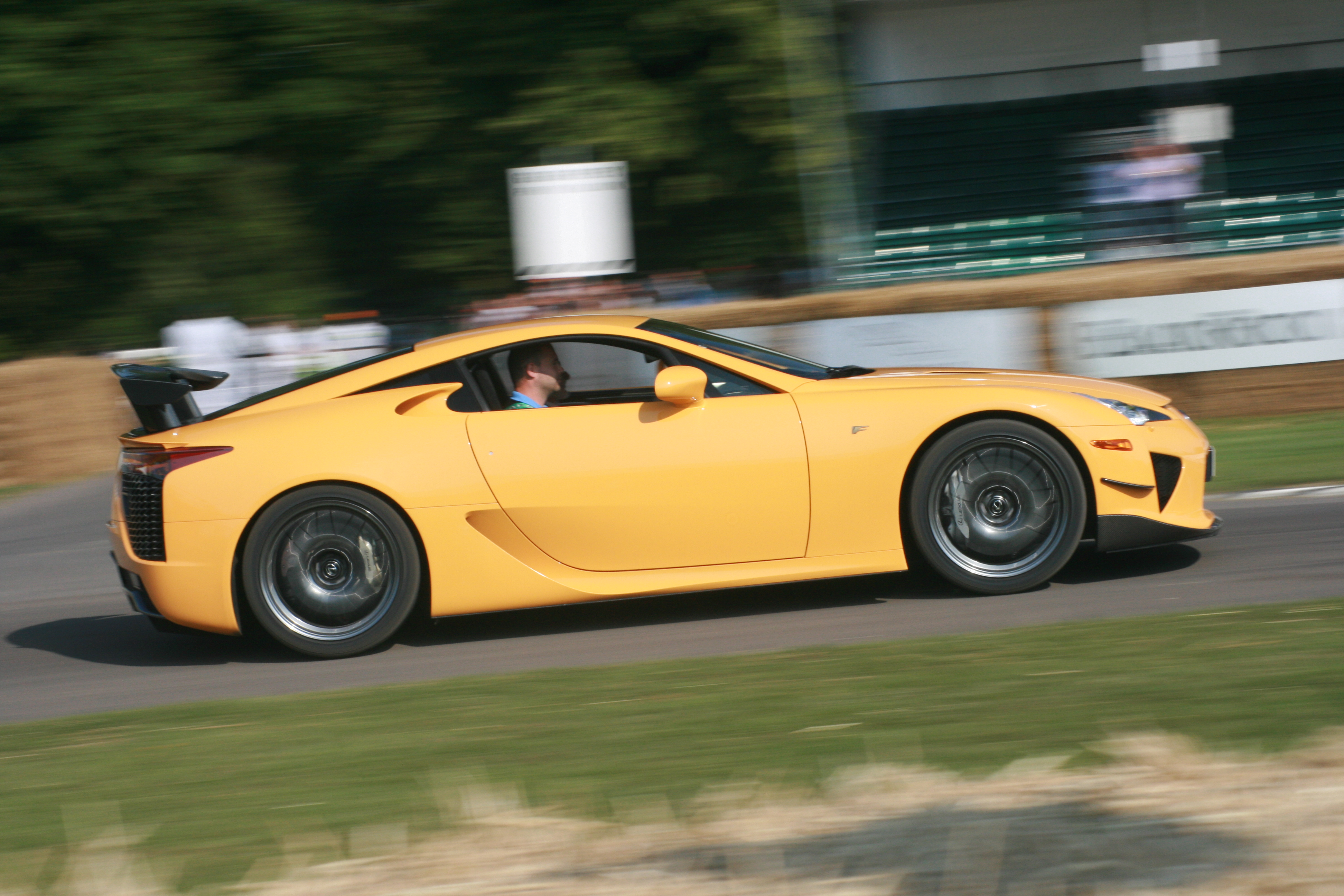 Lexus LFA